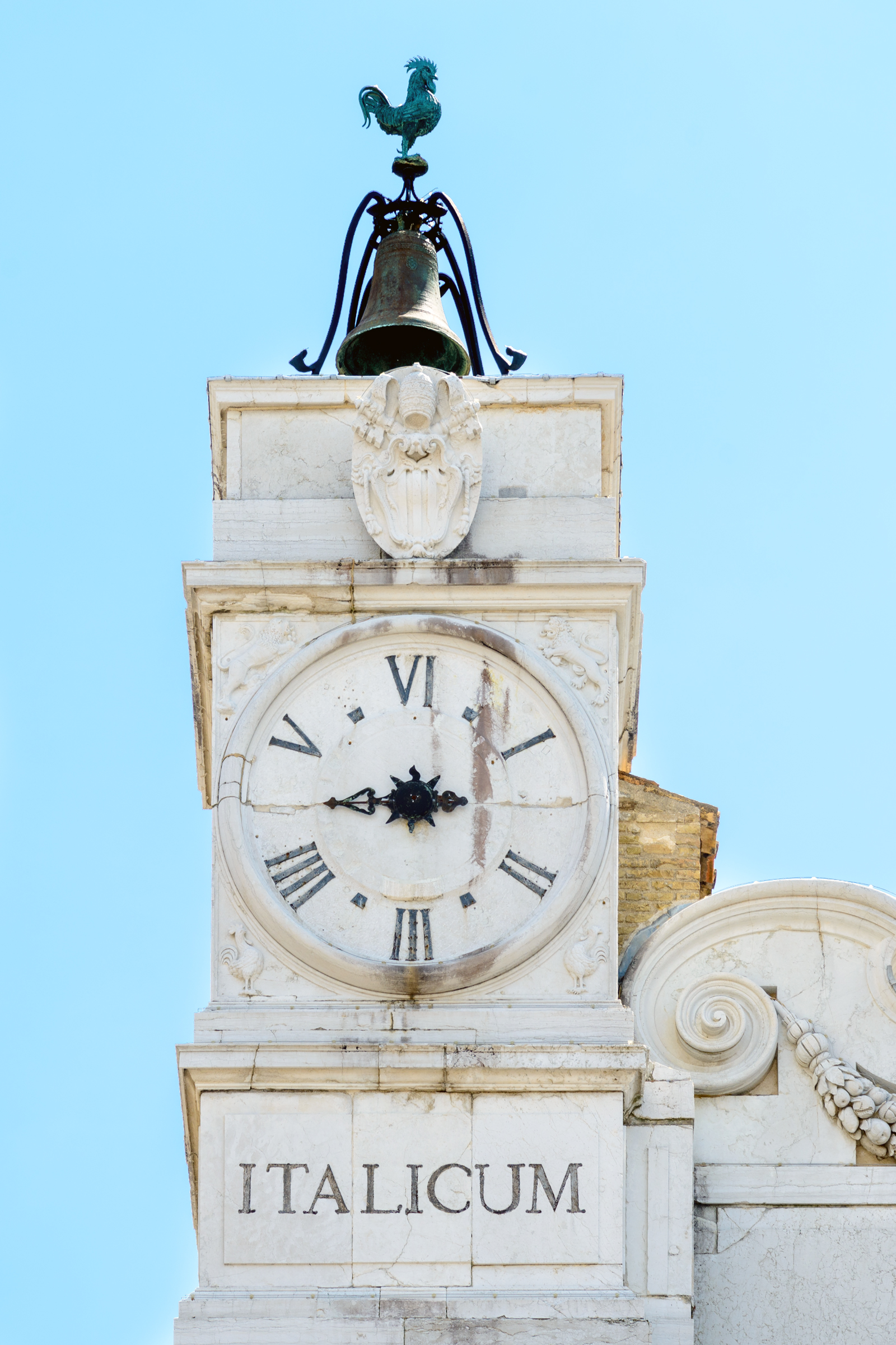 Orologio con ore italiche - Santuario della Santa Casa di Loreto